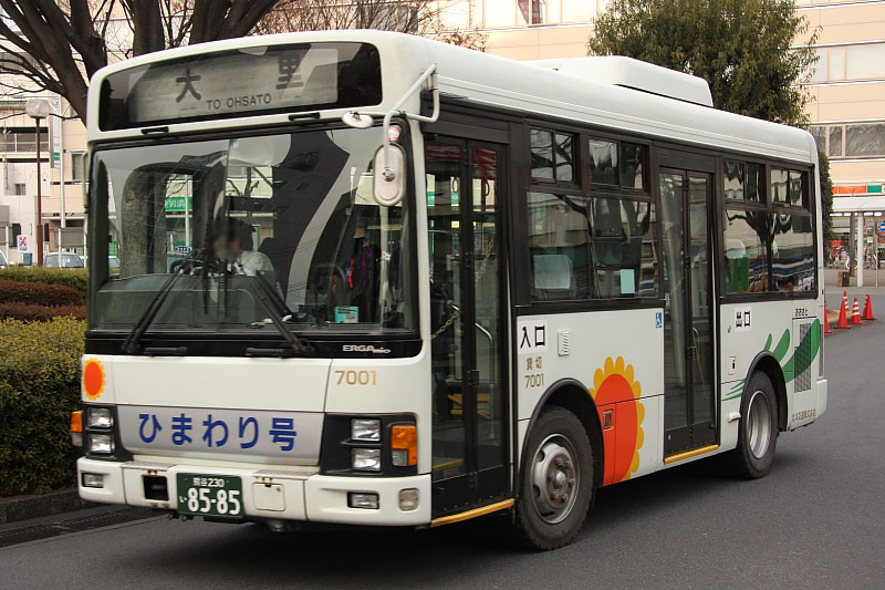 Hokuto Kotsu's route bus (Kumagaya City Himawari-go / Car No.7001 / Isuzu Erga Mio) at Kumagaya Station, Kumagaya, Saitama, Japan